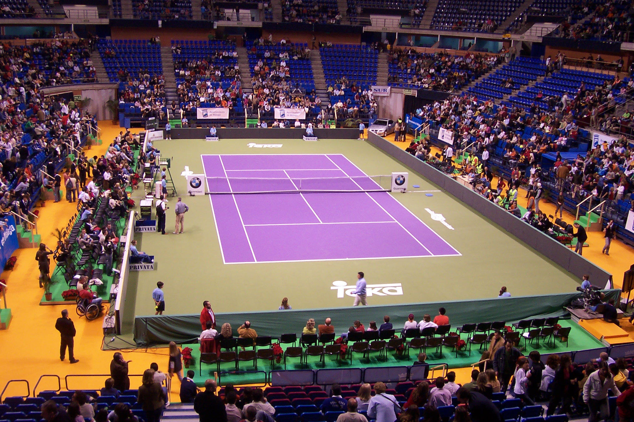 Edición 2006 del torneo Master de Málaga en el Palacio de deportes Martín Carpena, Málaga, España.